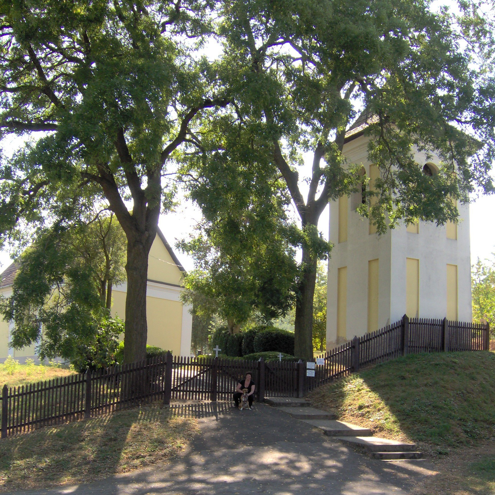 Római katolikus templom és harangláb, Kisecset (Nógrád megye)